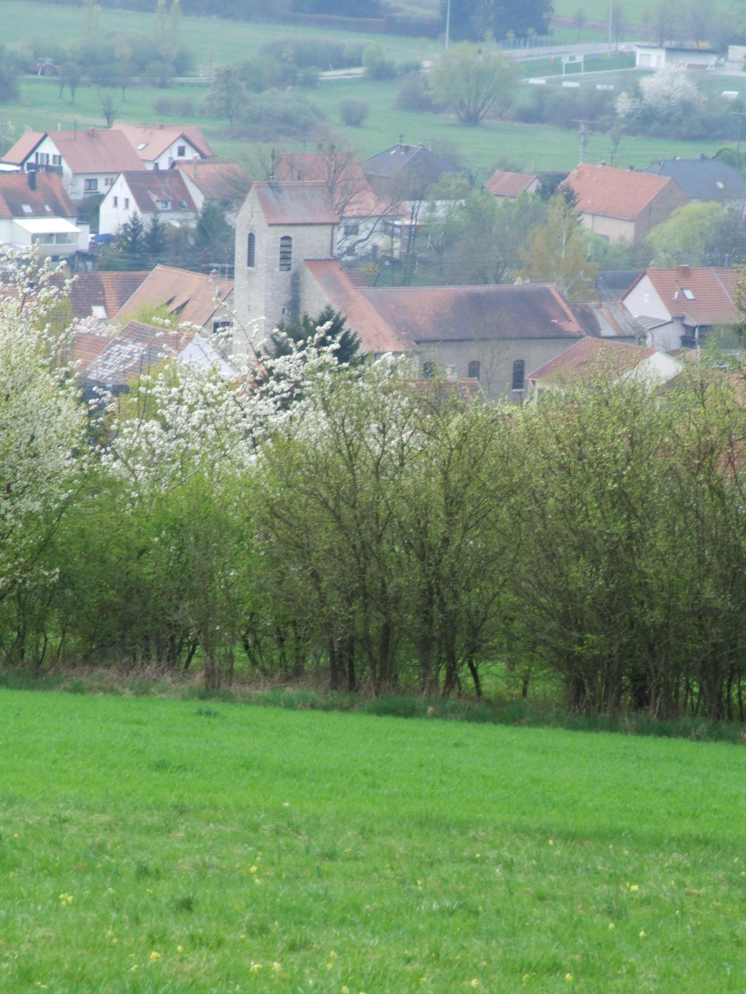 Blick vom Sperrberg auf die Bruder-Klaus-Kirche in Niedergailbach, Saarland, Deutschland